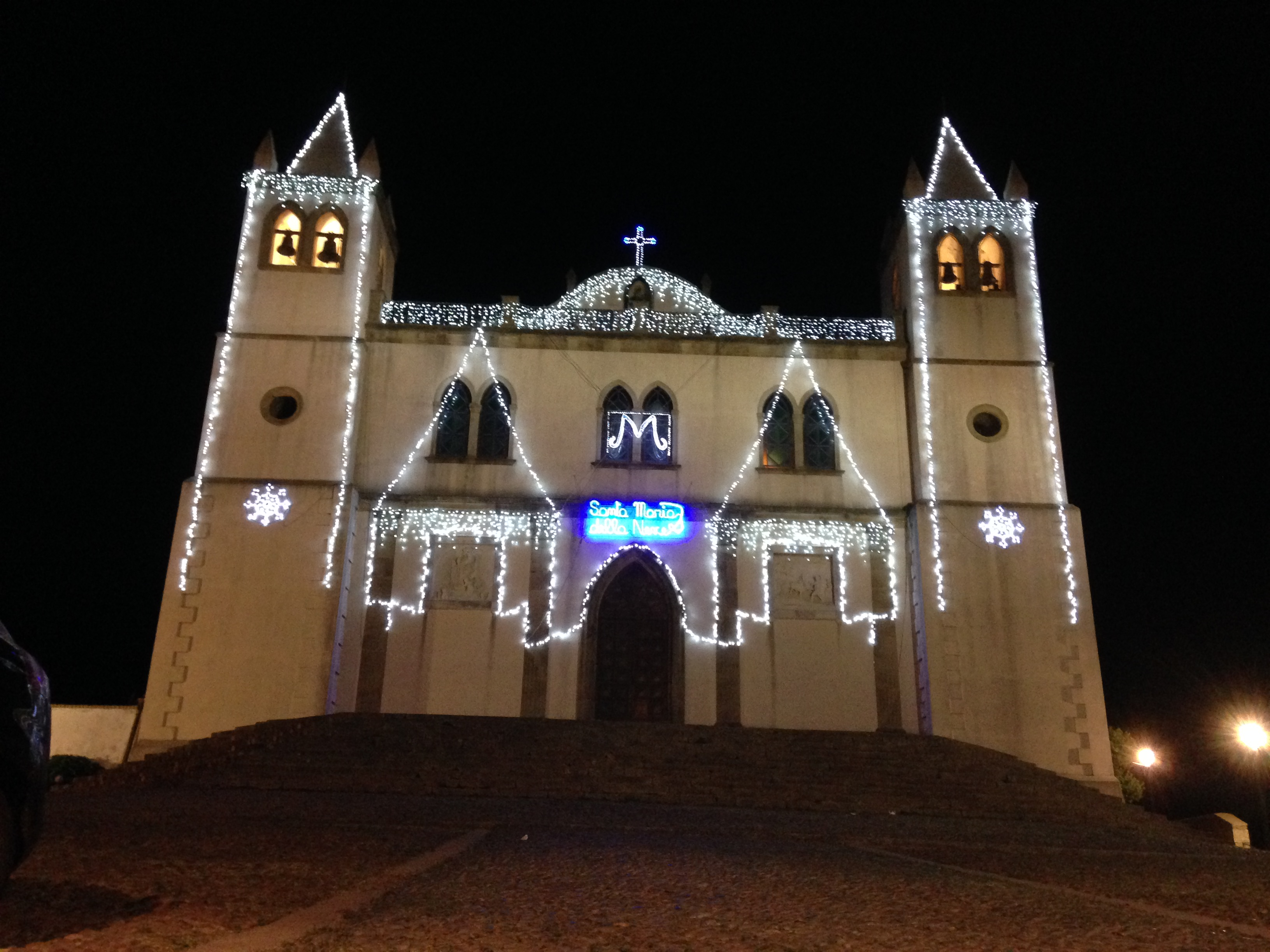 Basilica di Santa Maria della Neve durante i festeggiamenti di Santa Maria del 2016